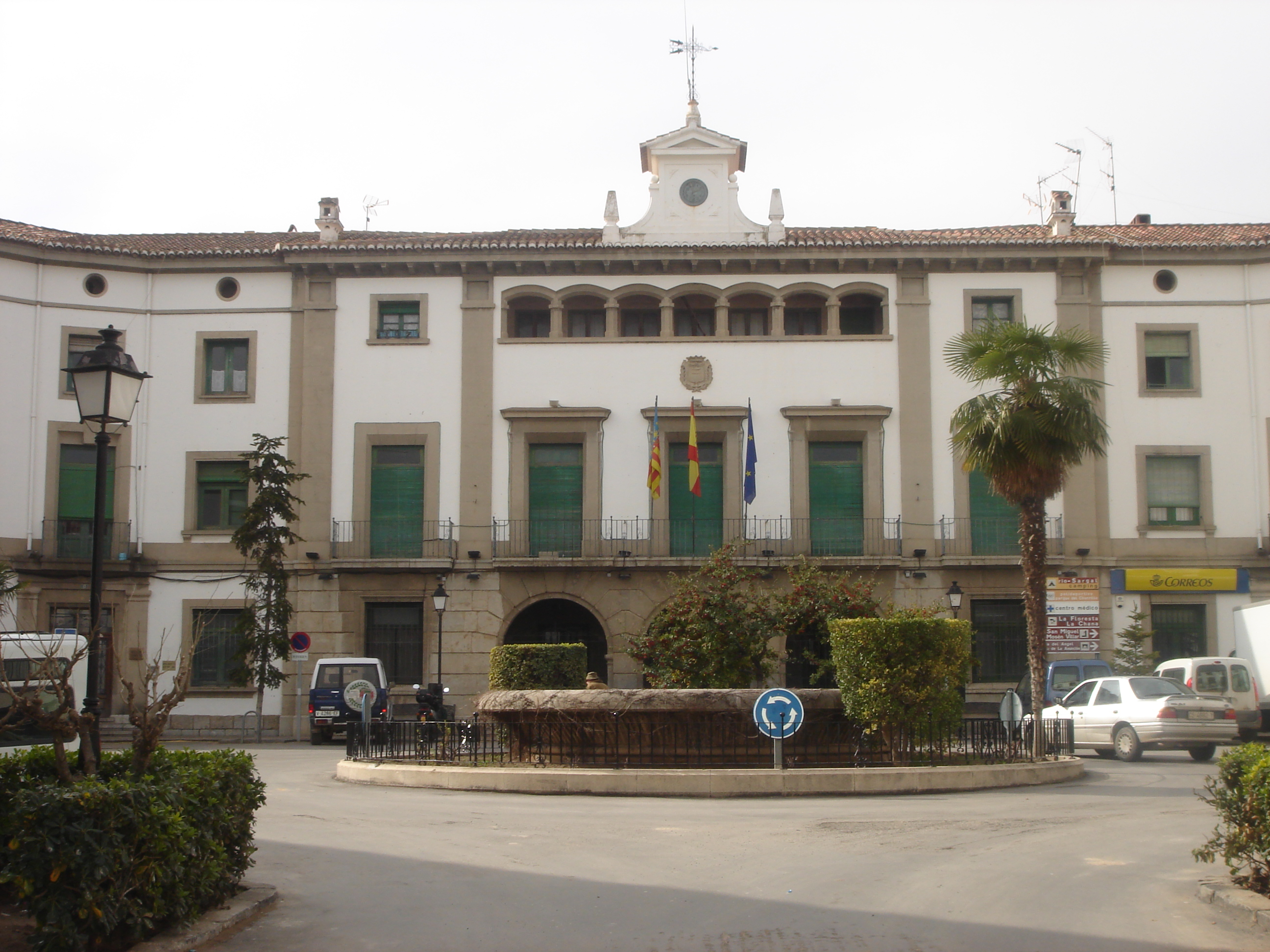 Ayuntamiento de Viver (Castellón)